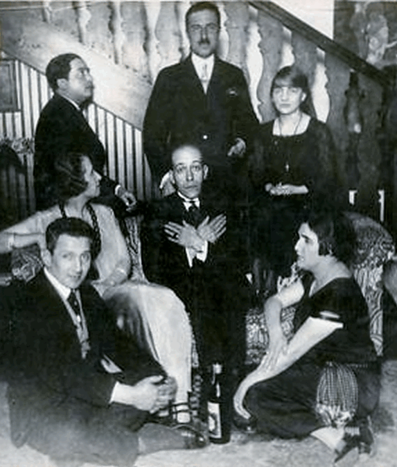 Luis Vargas Rosas & Mina Yañez (en el suelo; esposa de Emar), Juan Emar (centro), Joaquín Edwards Bello, Henri Hoppenot (diplomático francés destinado en Santiago hasta 1924) y Sara Malvar.